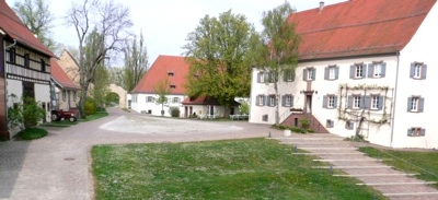 Kloster Kirchberg: Blick vom Konventgebäude zum Eingangsportal